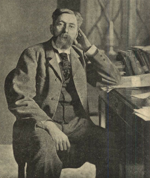 Hellen Lindgren 1901